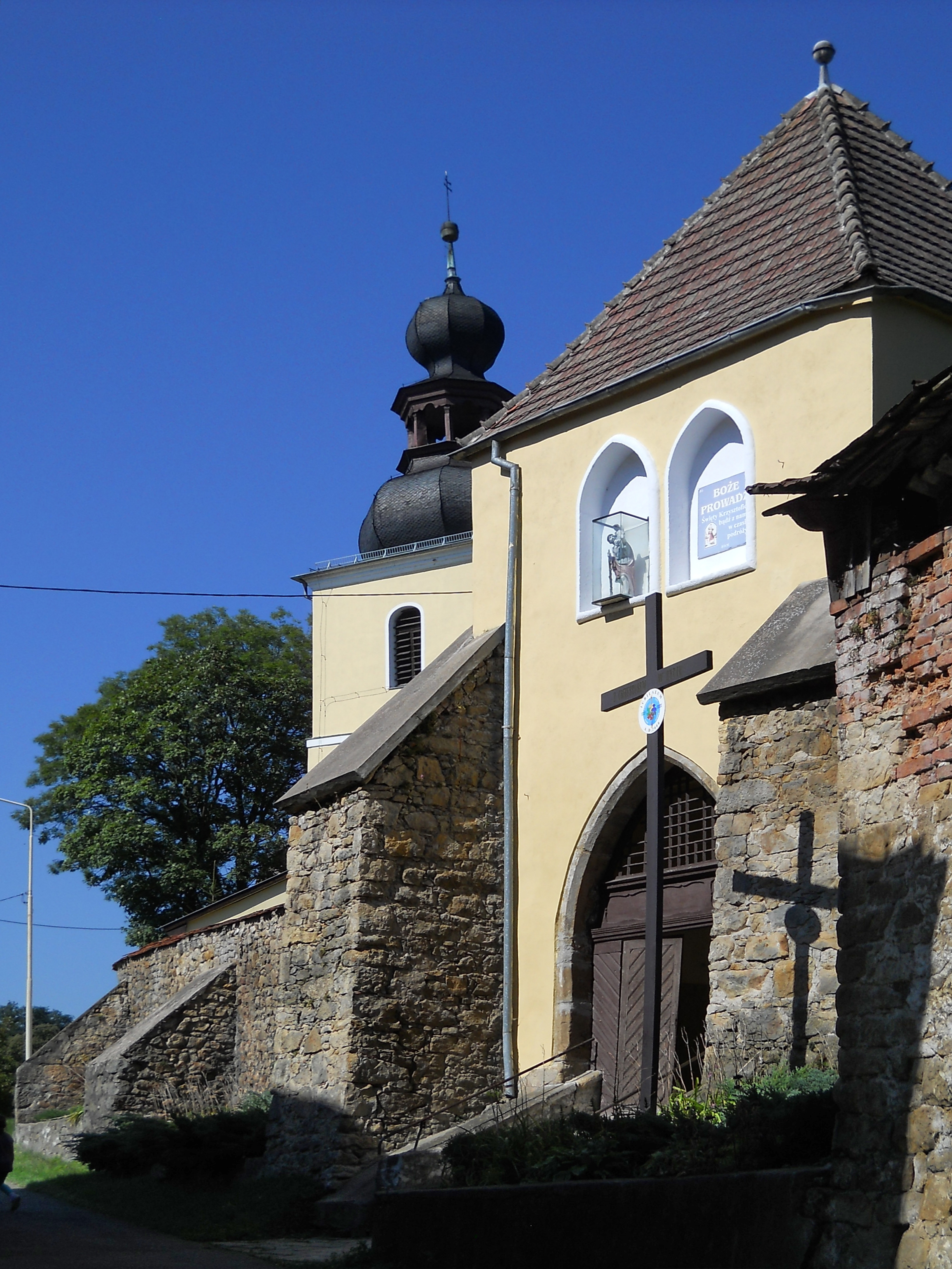 Szalejów Górny, budynek bramny